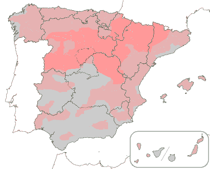 Áreas yeístas (gris) y distinguidoras en España